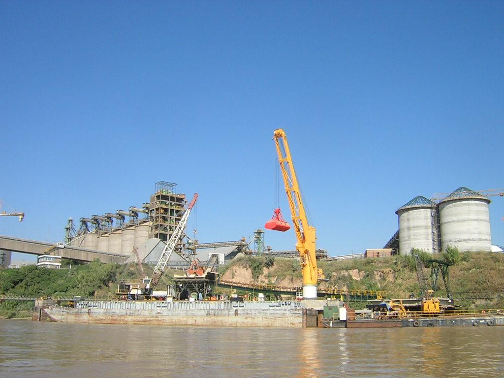 Quebracho Terminal at San Lorenzo Argentina